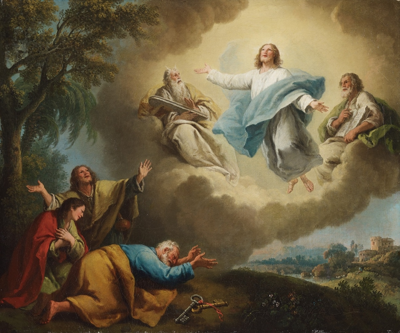 Landschaft mit Verklärung Christi. Öl auf Leinwand. 64 x 76 cm